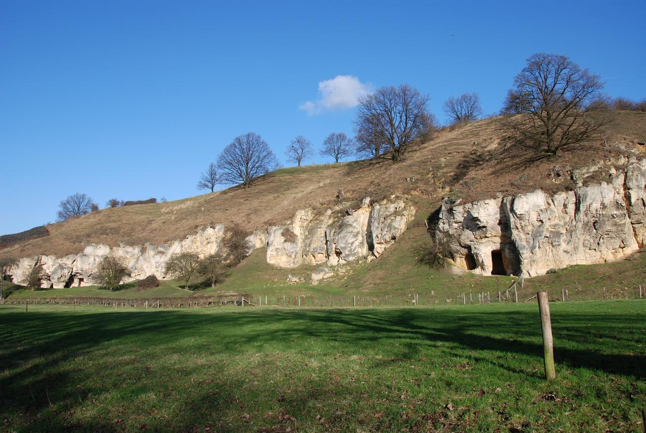 Limburgs: Bemelerberg, mergelgrot bie Bieëmele